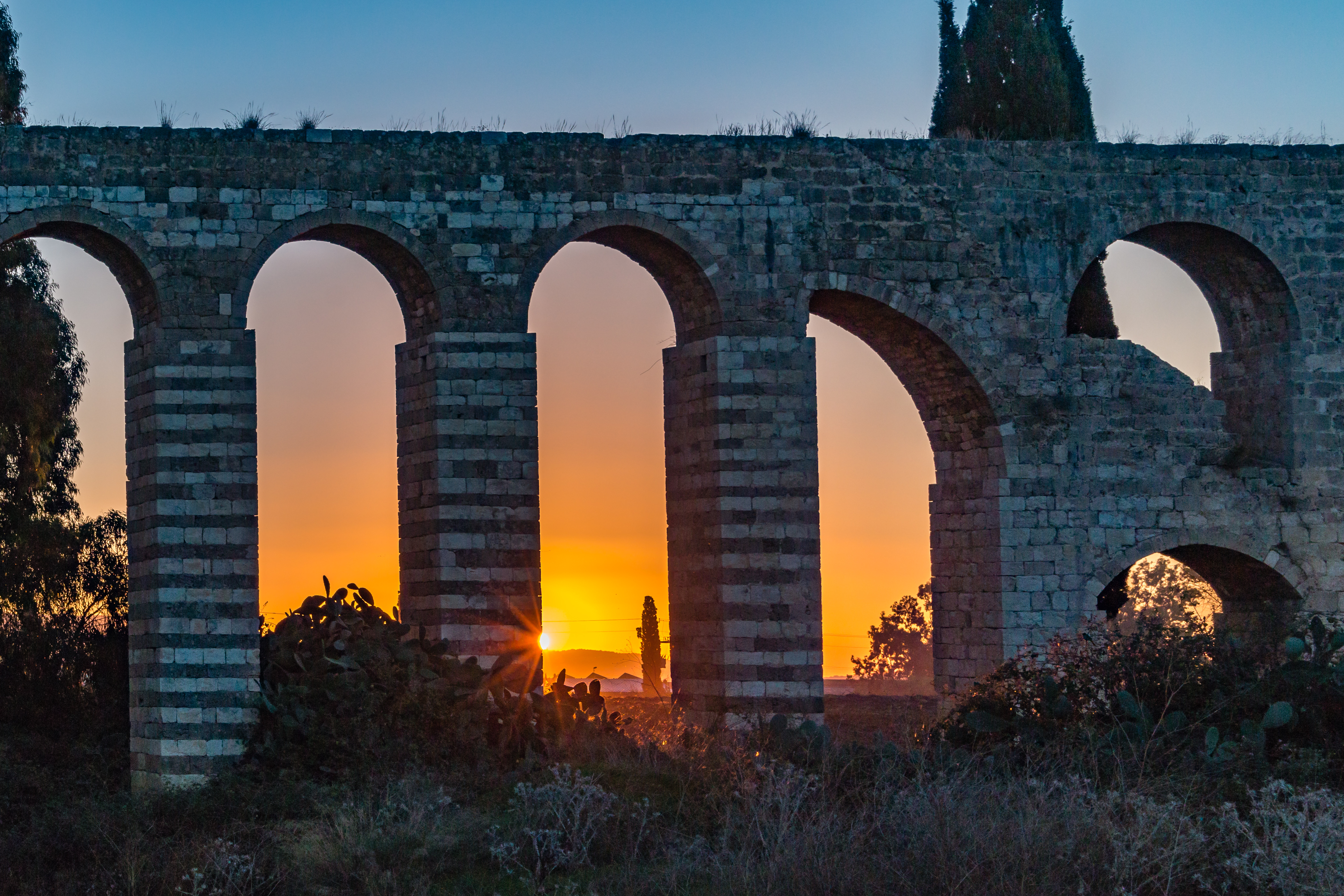 אמת עכו היא אמת מים שהובילה מים מאזור כברי אל העיר עכו. אמה זו ששרידיה נראים עד היום בתחומי העיר עכו ומצפון לה, נבנתה על ידי סולימאן פאשה, והייתה האמה השלישית ששירתה את העיר. קדמו לה אמה הלניסטית ואמה שהוקמה על ידי אחמד אל-ג'זאר ונהרסה בידי נפוליאון בשנת 1799.